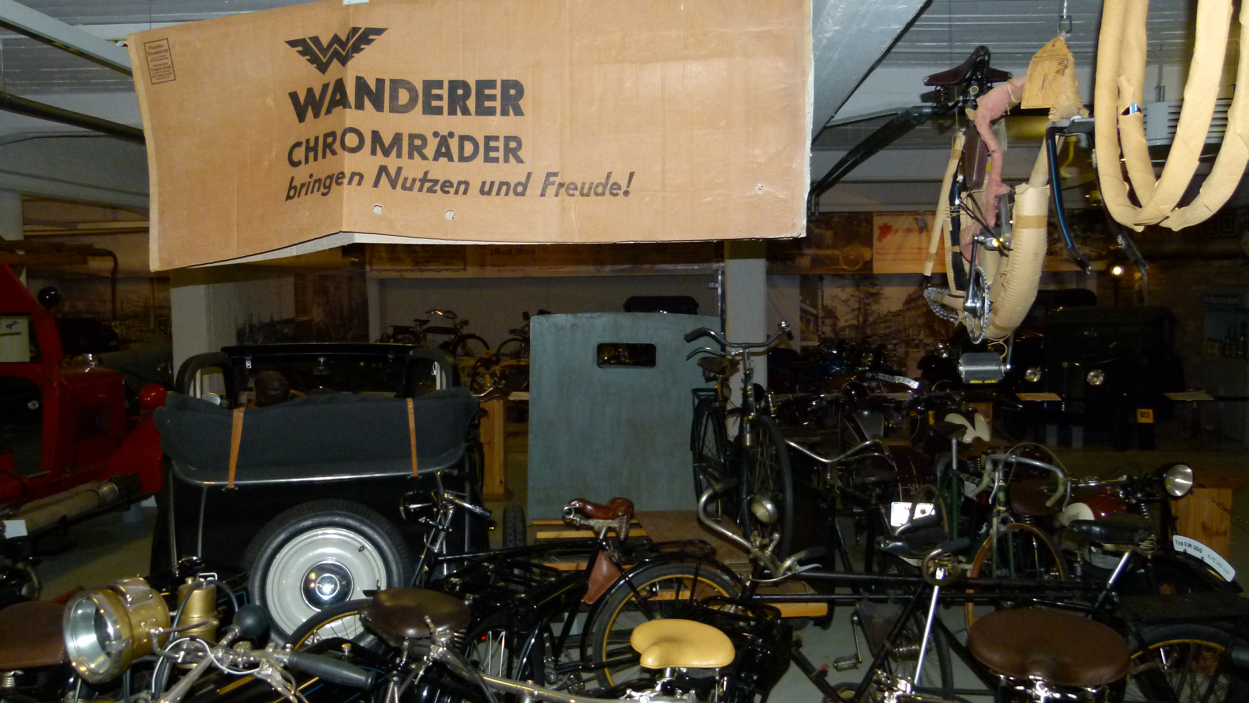 Museum für sächsische Fahrzeuge, Chemnitz